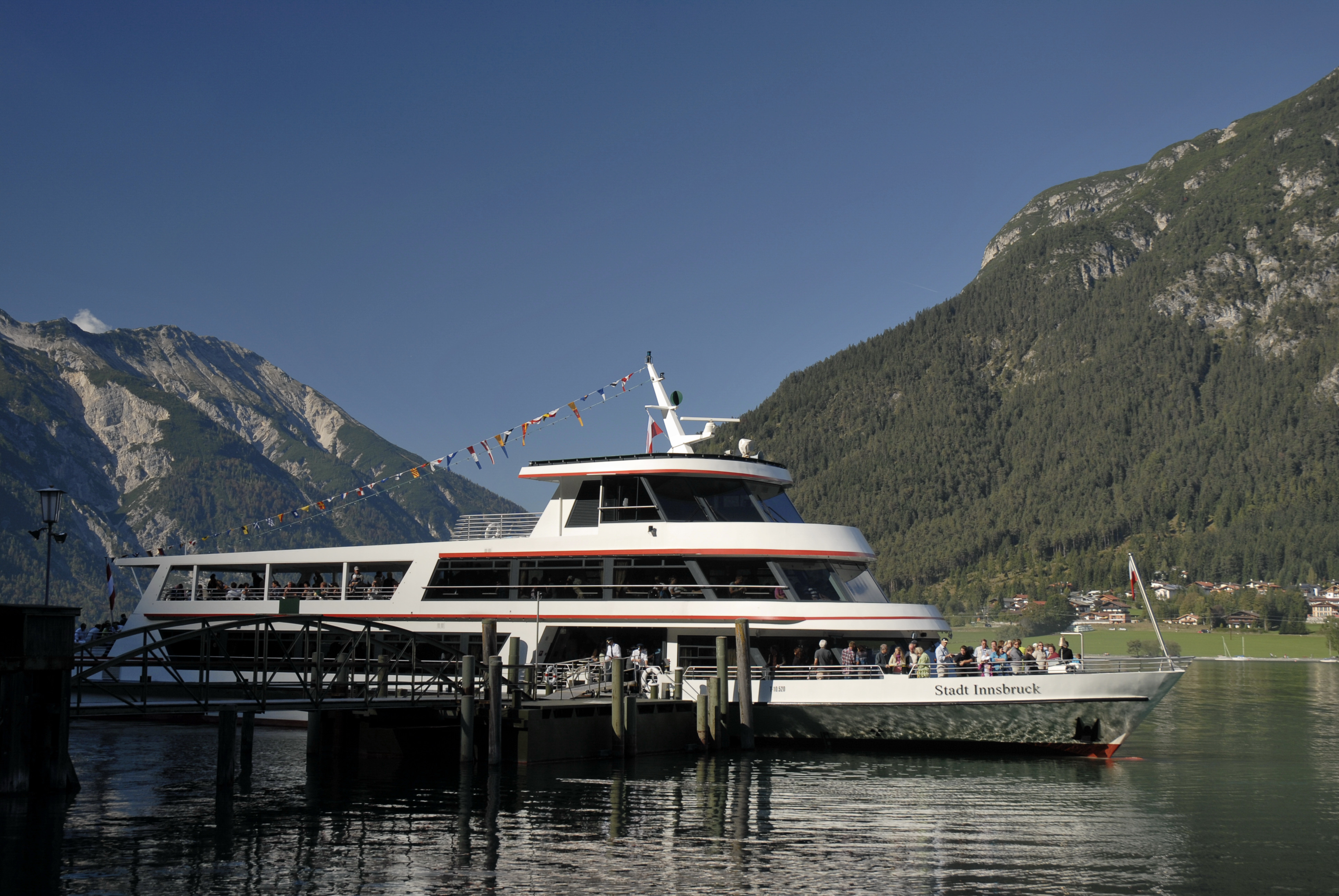 Achensee, Schiff "Stadt Innsbruck" an der Anlegestelle Seespitz zwischen Maurach und Pertisau, im Hintergrund die Seekarspitze